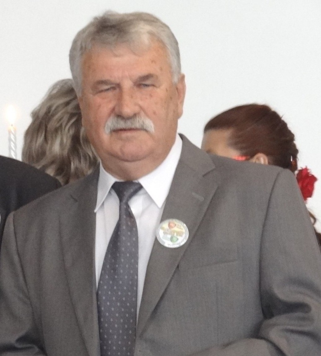 Przasnysz. Dyrektor mgr Henryk Mocek